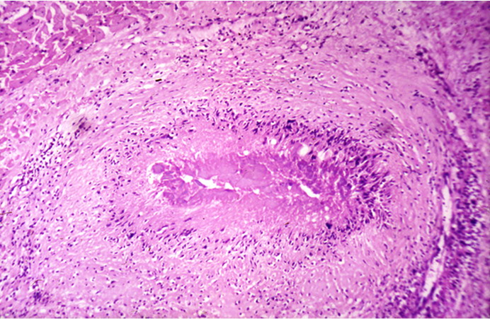 Nekrose